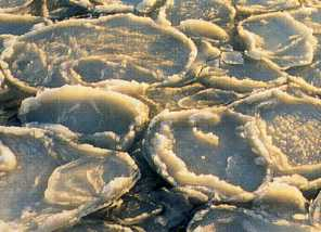 Pfannkucheneis in der westlichen Ostsee